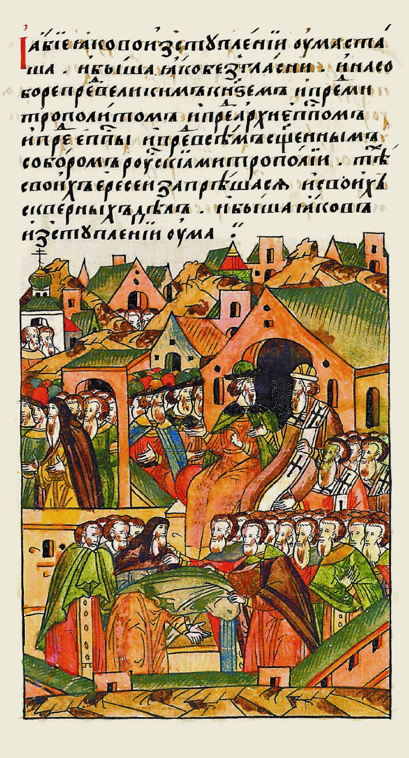 Собор 1490 года. Лицевой летописный свод Книга 17 стр. 136